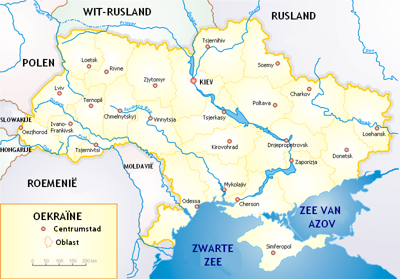 Oekraïne